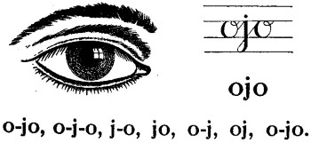 Ilustracion de la primer pagina del "Silabario Matte", conocido como "El ojo" a raiz de esta imagen.